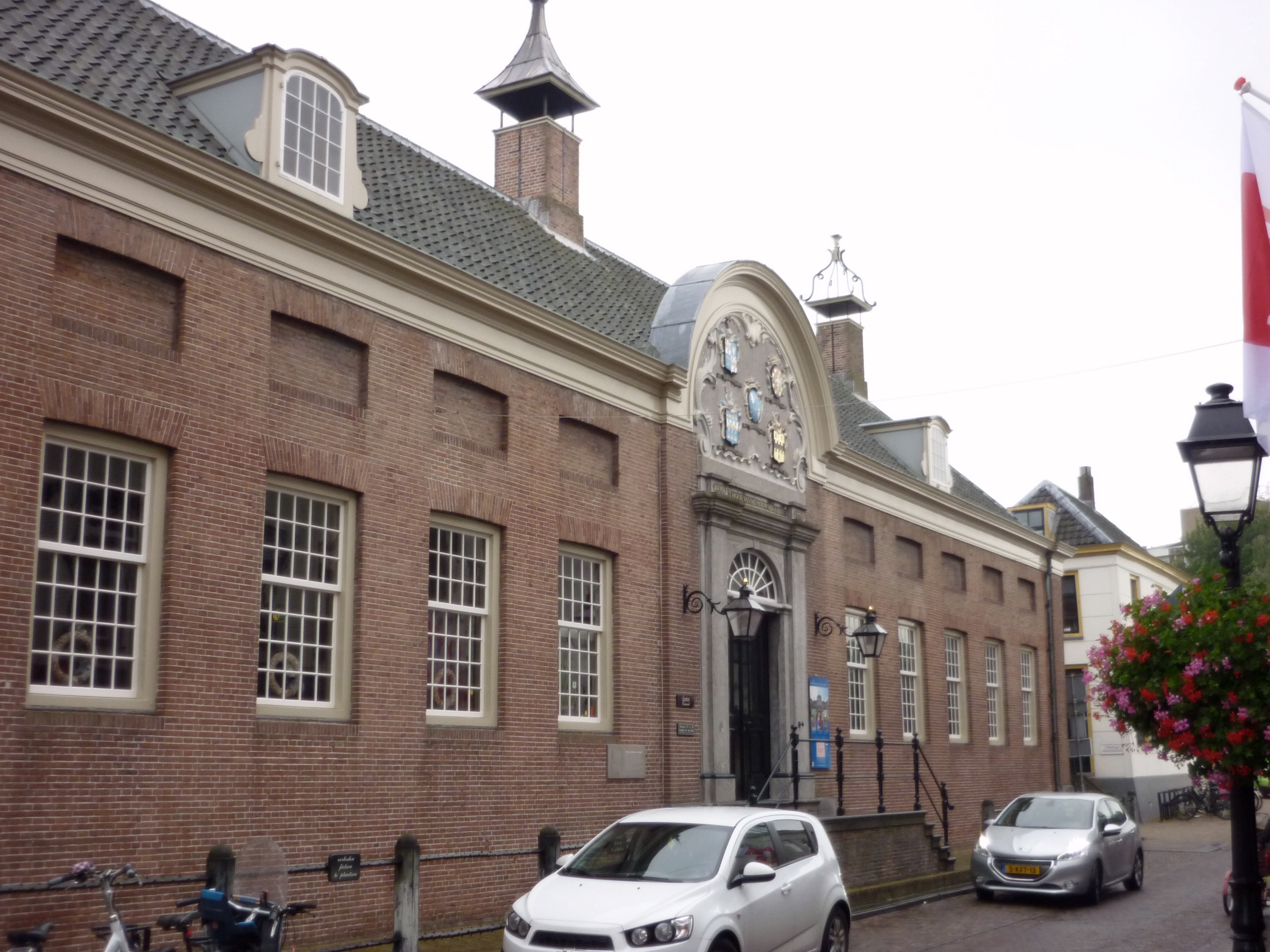 Hof der Frau Van Aerden, Ansicht der Straßenfront von Nordosten